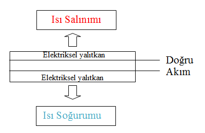 Temsili Peltier Soğutucu Yapısı